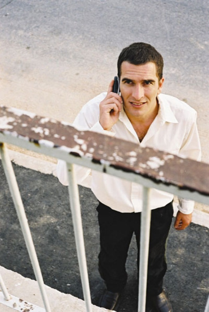 אסי כהן בסרטו של תום שובל "הלב הרעב", 2005